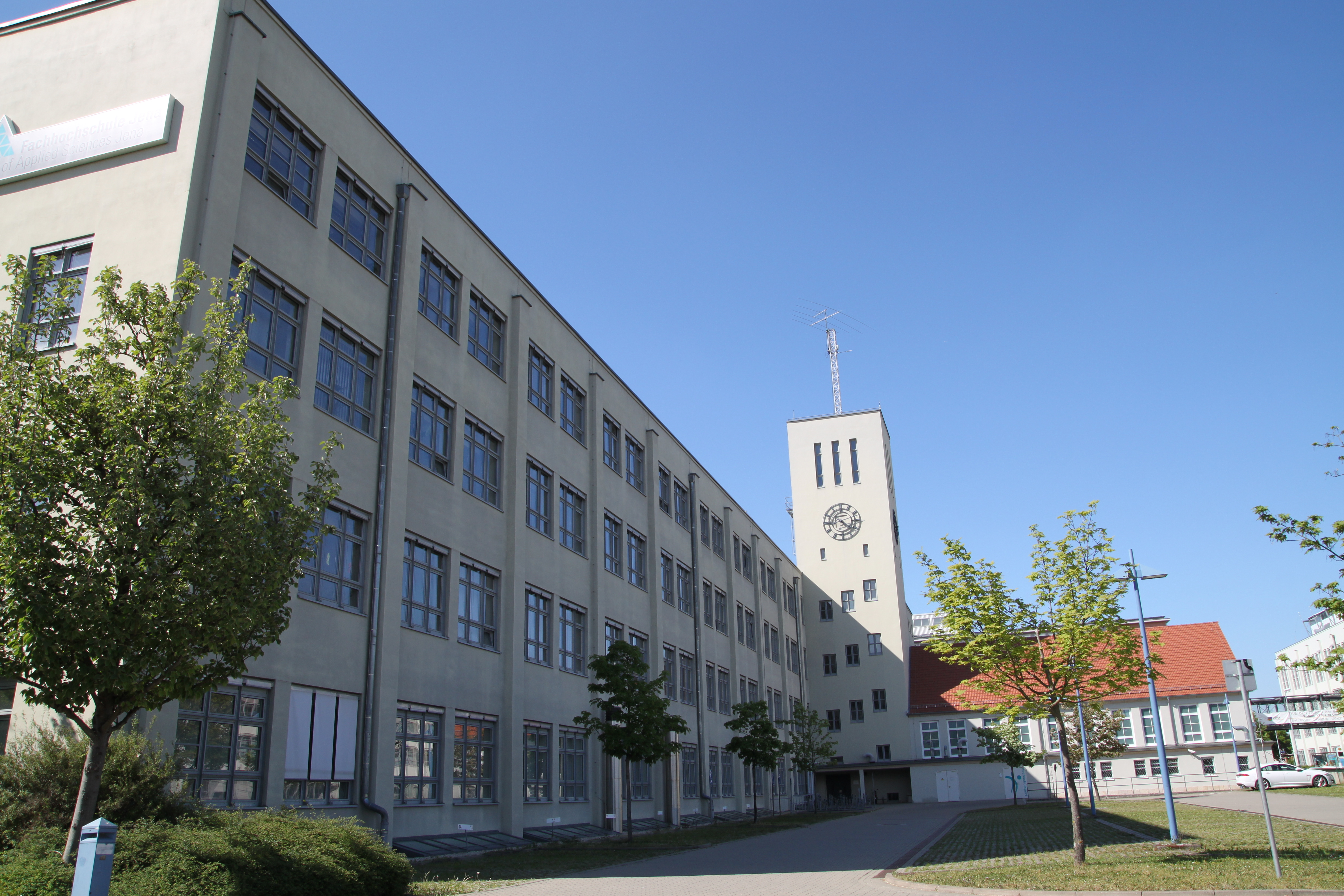 Ernst - Abbe - Hochschule Jena, Haus 3